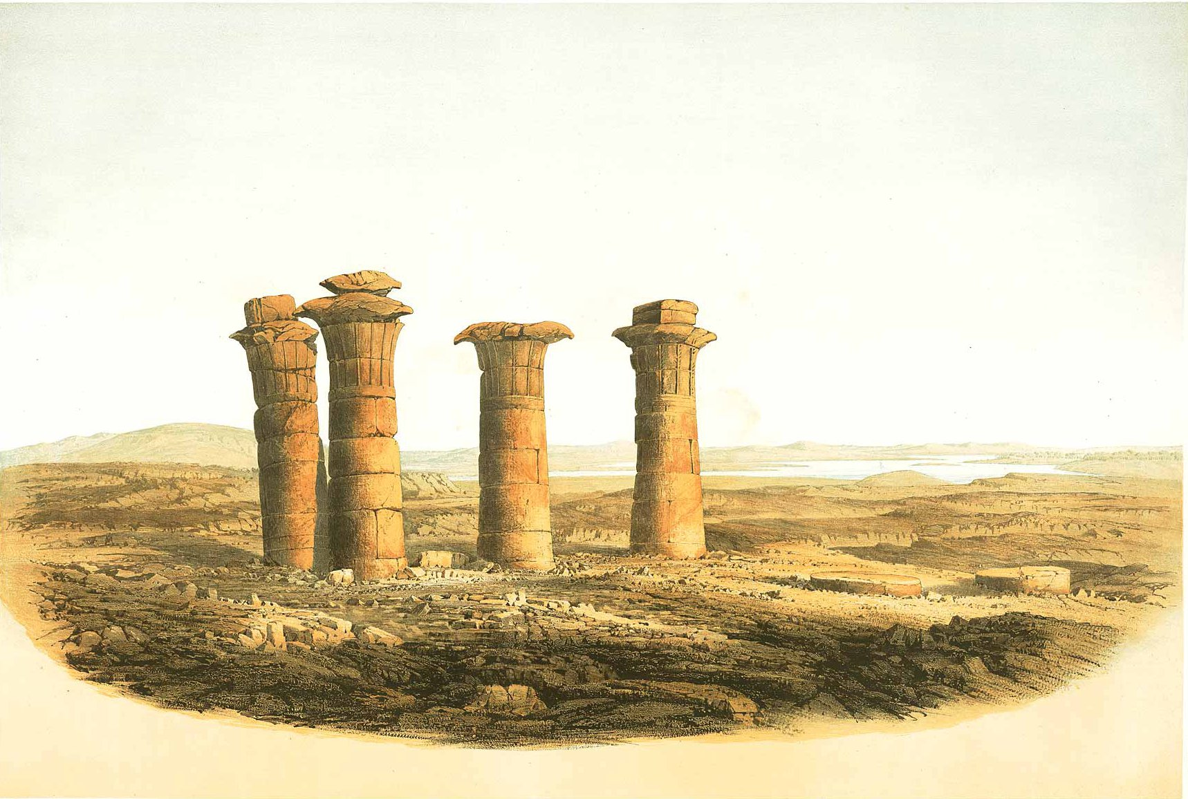 Ansicht der Ruinen von Sesebi. Aus: Denkmaeler aus Aegypten und Aethiopien nach den Zeichnungen der von Seiner Majestät dem Koenige von Preussen, Friedrich Wilhelm IV., nach diesen Ländern gesendeten, und in den Jahren 1842–1845 ausgeführten wissenschaftlichen Expedition auf Befehl Seiner Majestät